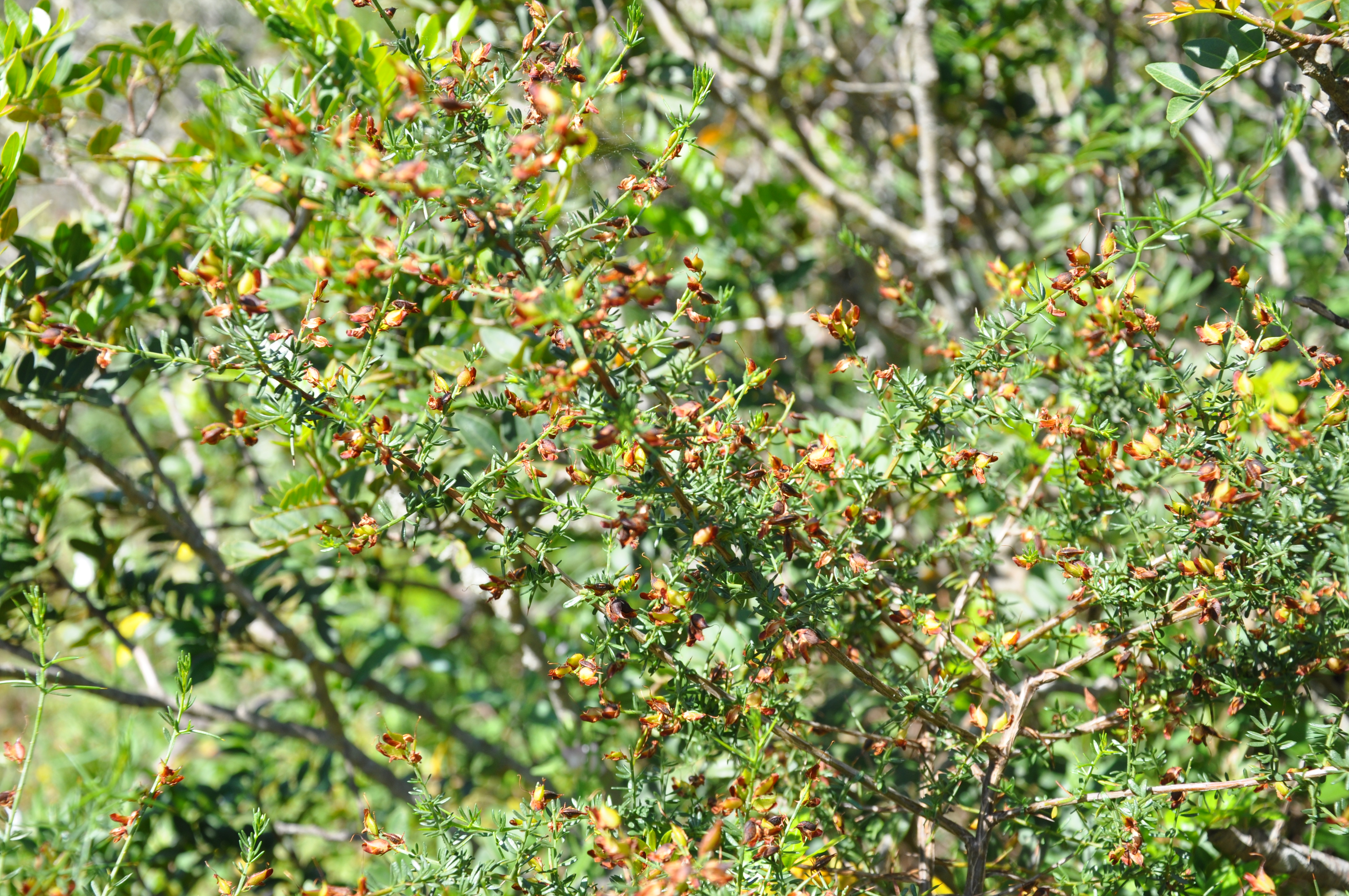 Aulaga morisca en la Ruta de los Molinos, Patrite, Alcalá de los Gazules, Cádiz, España. This is a photography of a Site of Community Importance in Spain with the ID: ES0000049. Natura2000 entry, EEA entry